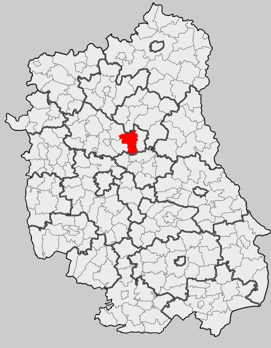 Map of gmina Ostrów Lubelski, Lubartów county, Lublin voivodship Mapa gminy Ostrów Lubelski, powiat lubartowski, województwo lubelskie